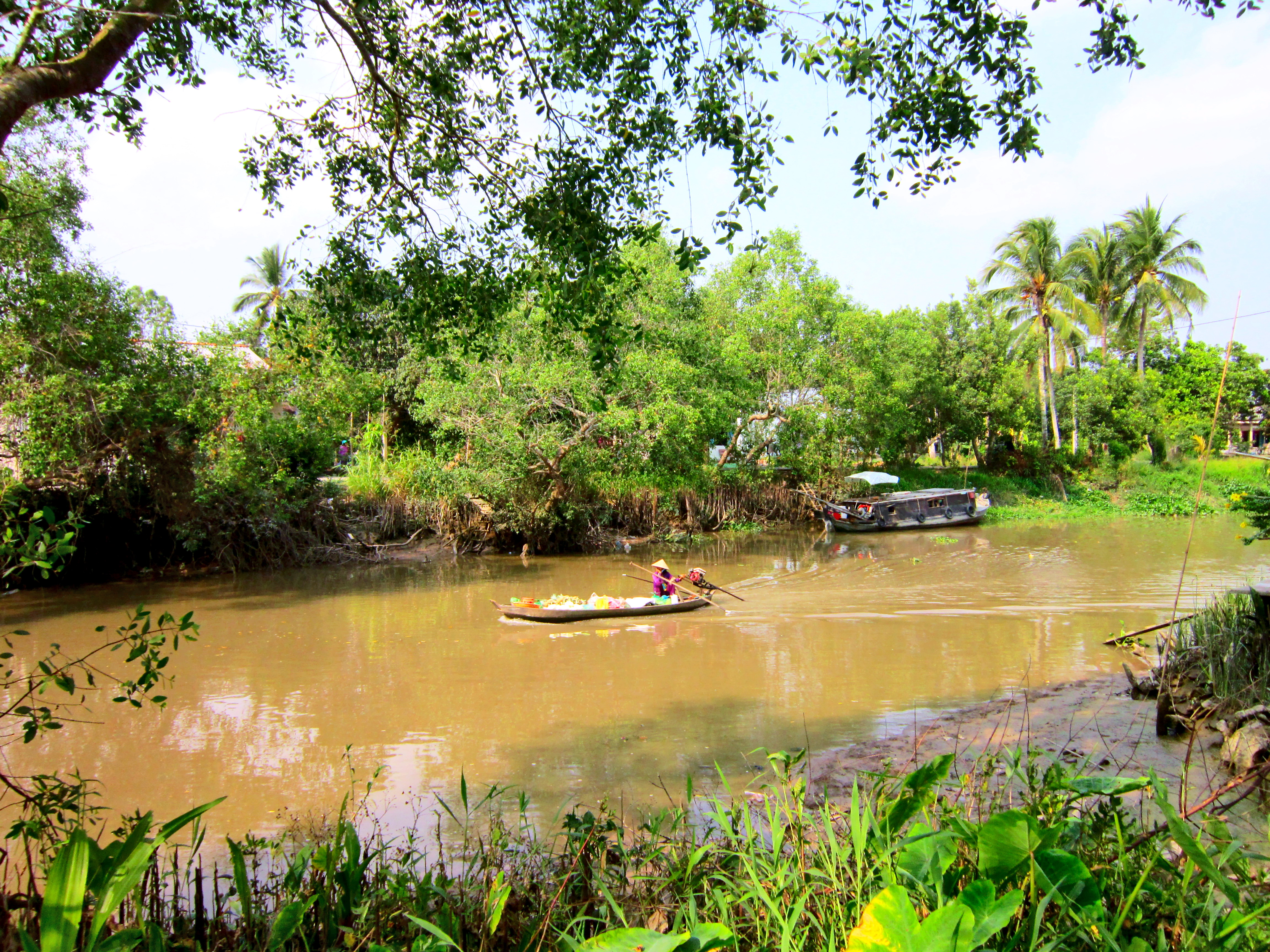 Một con rạch nhỏ ở phường Long Tuyền, quận Bình Thủy, TP. Cần Thơ, Việt Nam.